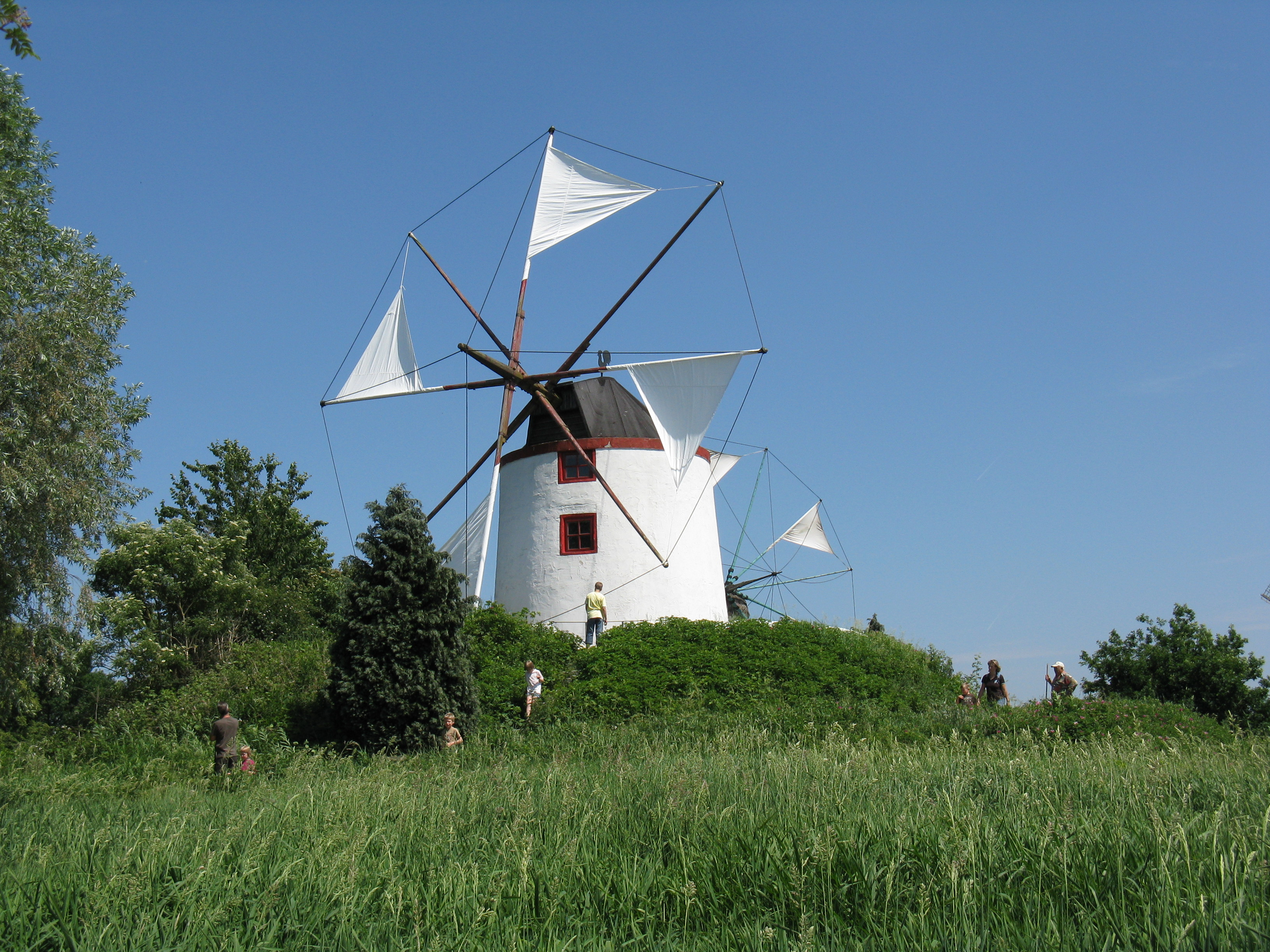 Mühlenmuseum Gifhorn: portugiesische Mühle